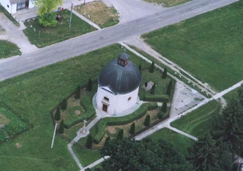 Kisgyalán, Hungary, aerialphotography. Szent Kereszt felmagasztalása római katolikus (kerek) templom.